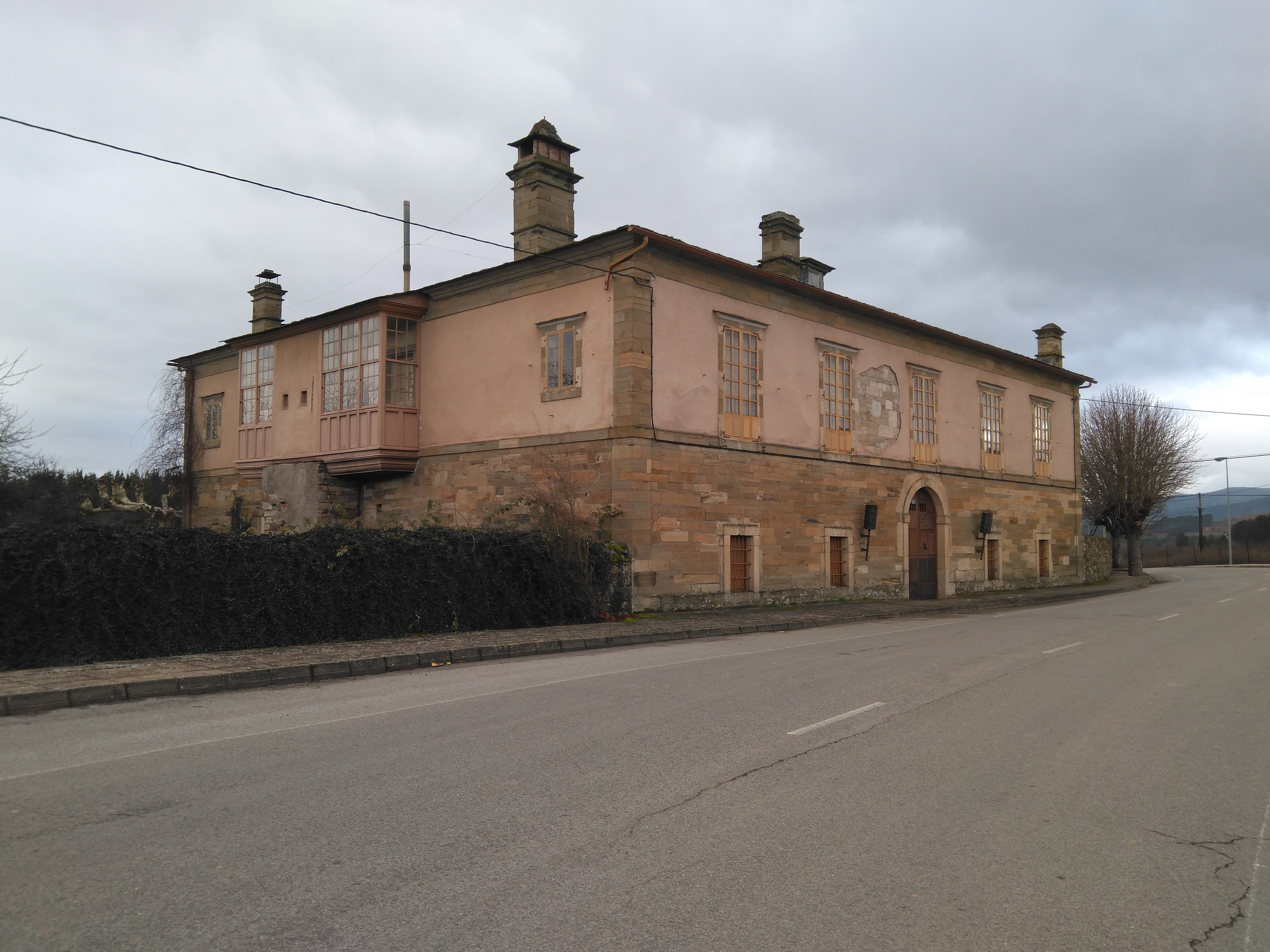 Palacio de Arganza en el municipio de Arganza, reconstruido entre 1809 y 1866, dedicado gran parte a la producción de vino.